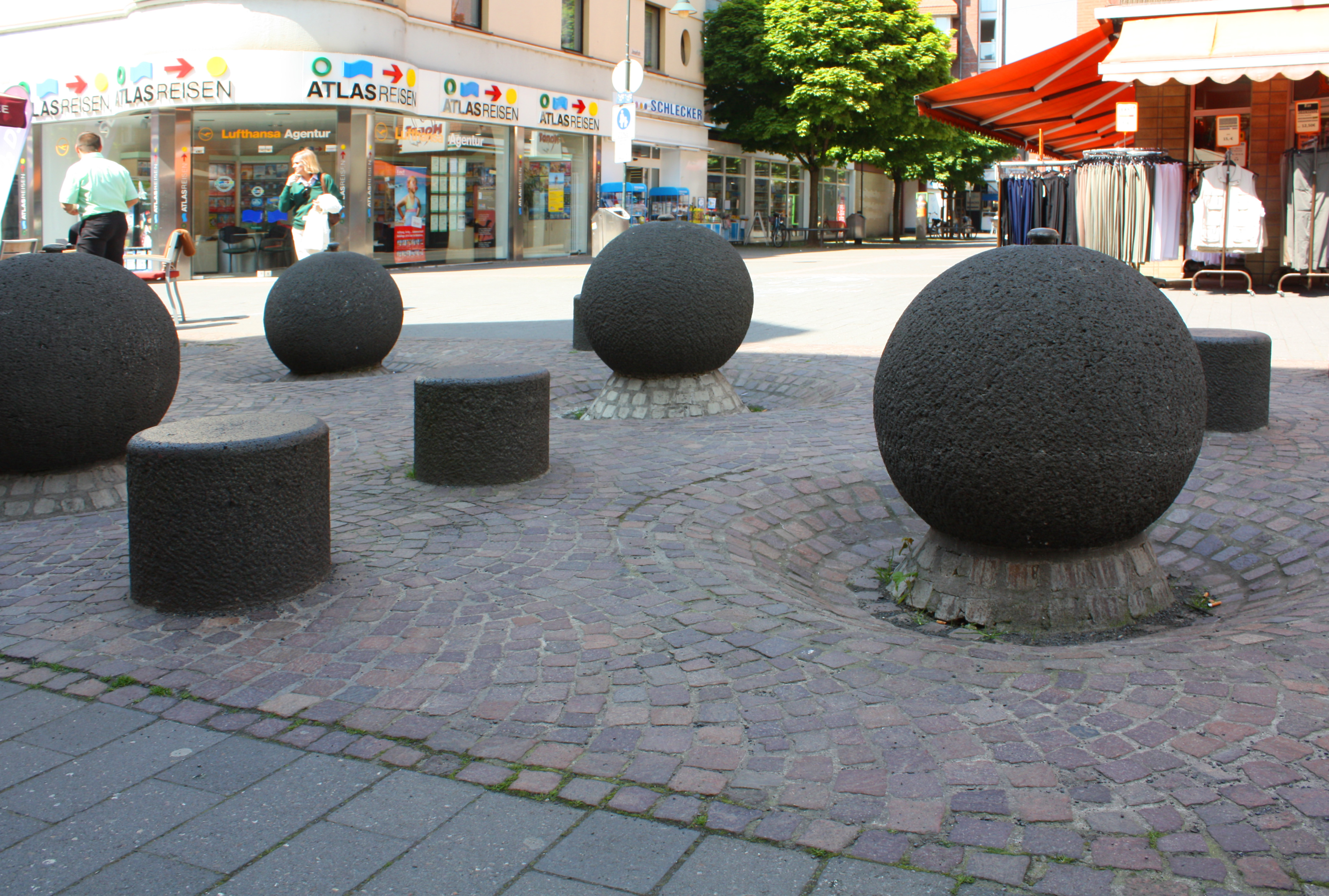 Köln-Porz, Kugelbrunnenanlage in der Fußgängerzone der Bahnhofstraße. Entwurf des Jahres 1974 von Gottfried Kühn